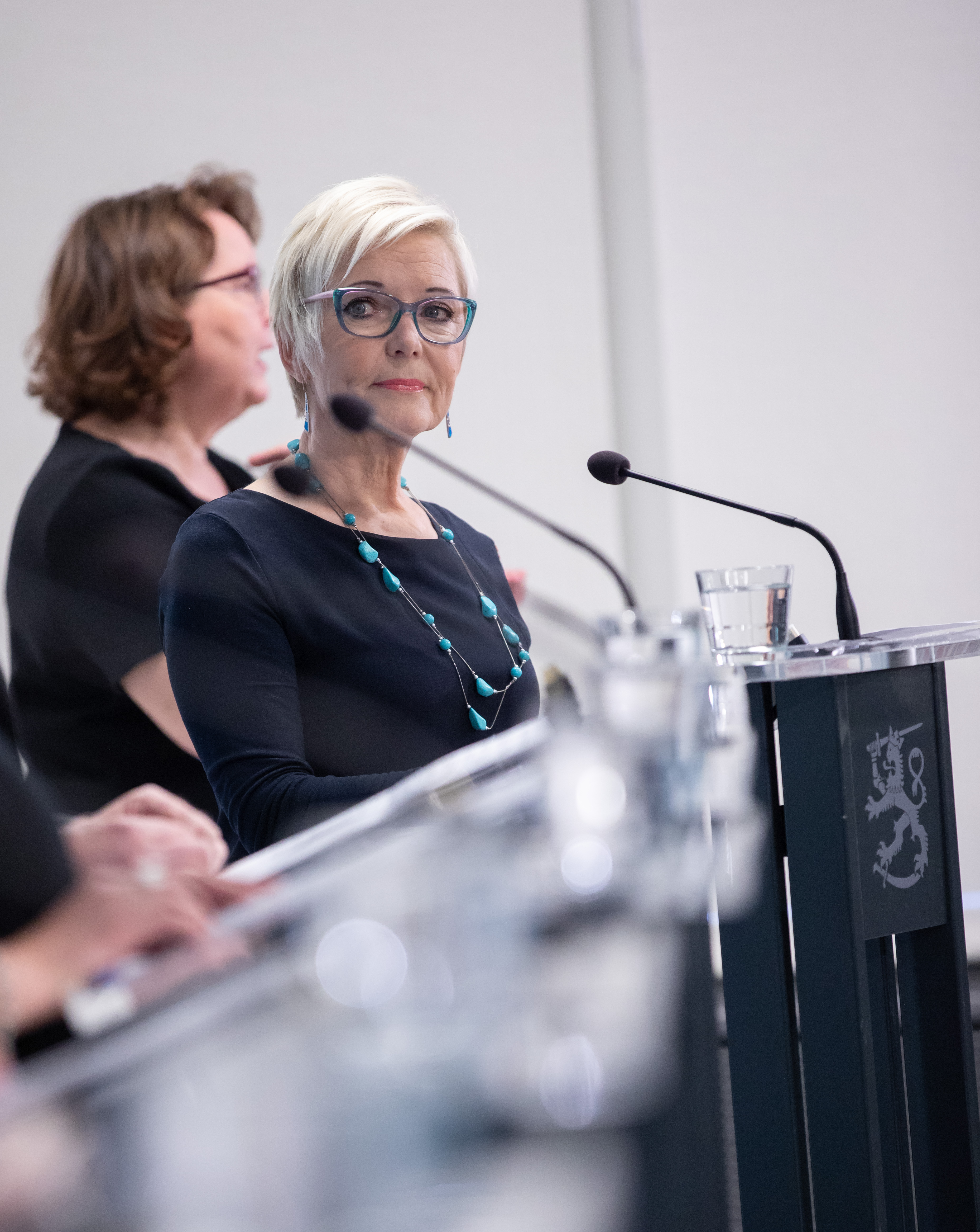 Toimittaja Pirjo Nuotio © Lauri Heikkinen/valtioneuvoston kanslia